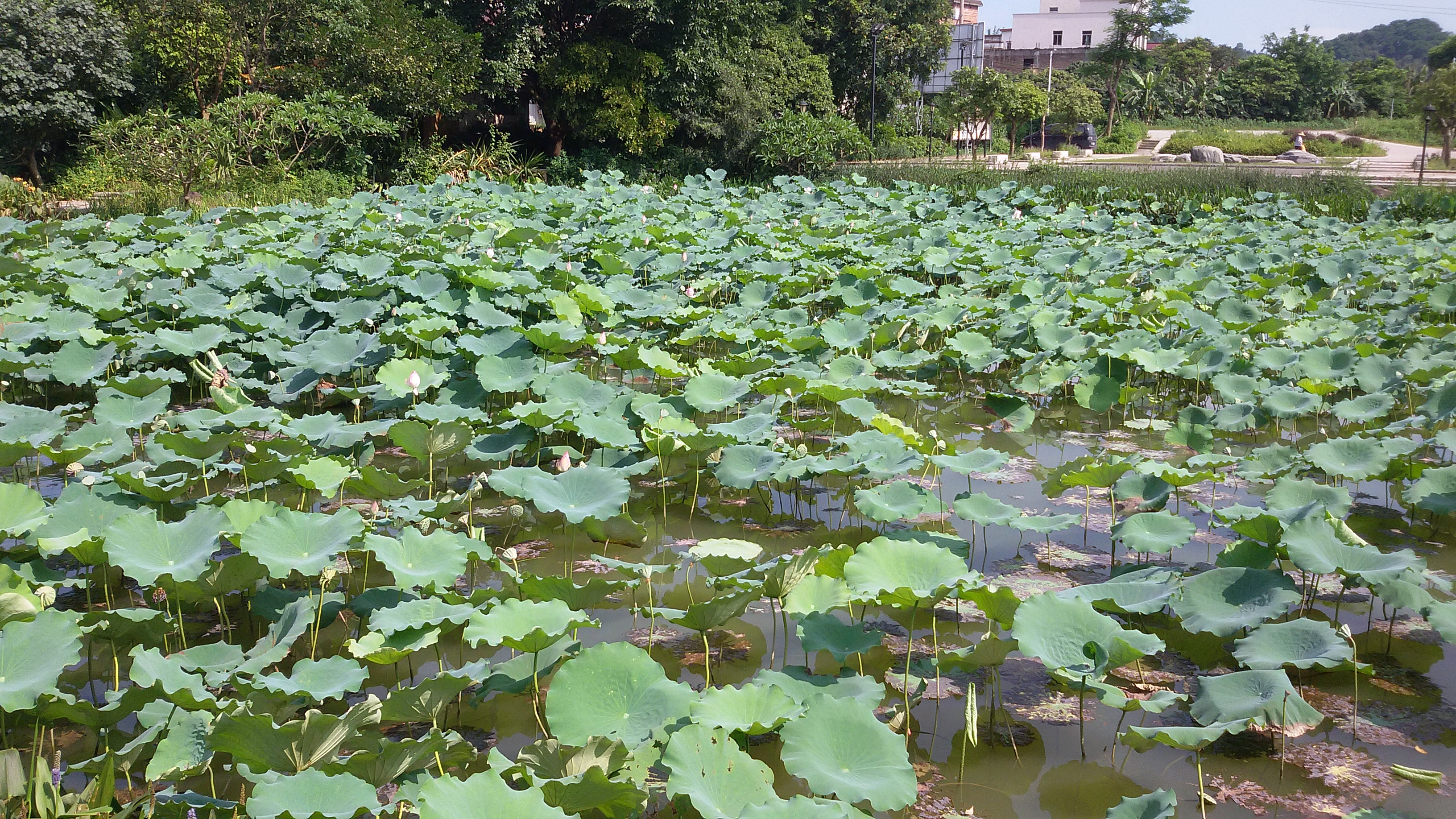 粵語: 個村從開村到而家，重有好多蓮花響度。